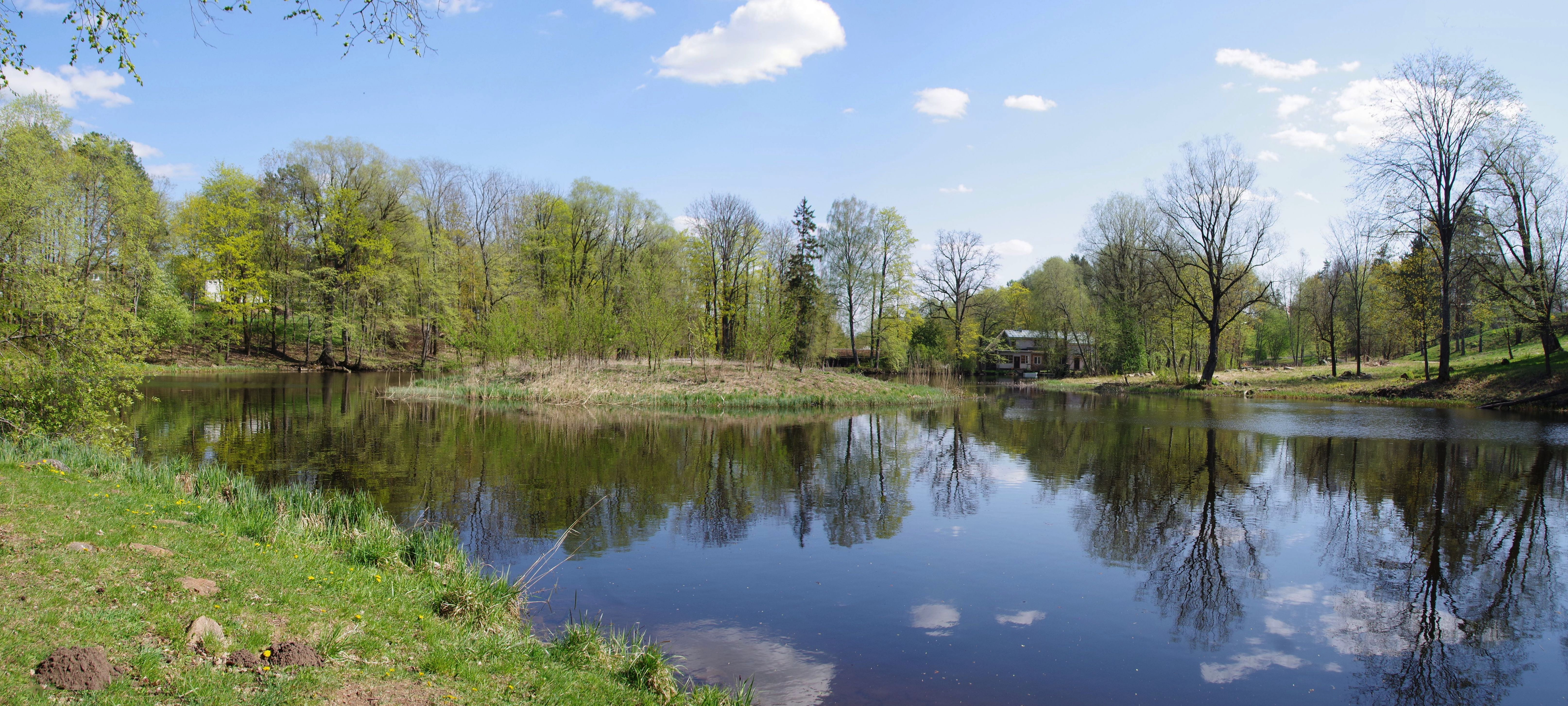 Uueveski järv on paisjärv Sakala kõrgustiku põhjaosas, Viljandi linnas.